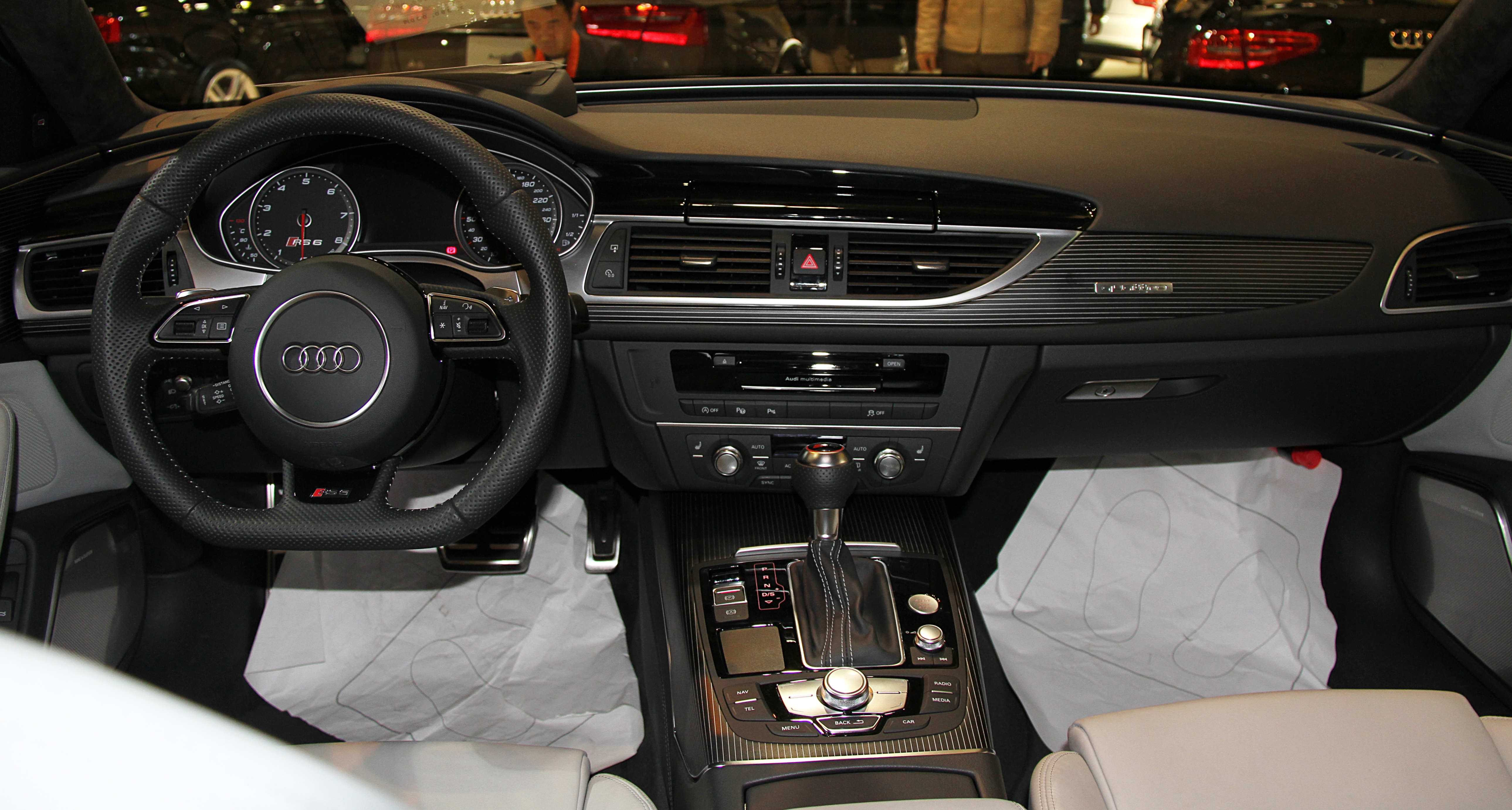 Audi RS6 Avant